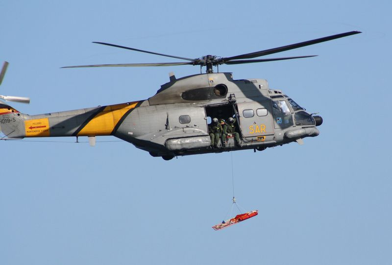 Rescate desde un Helicóptero Aerospatiale SA 330J Puma, Vigo